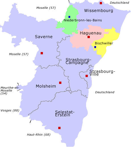 Arrondissement Haguenau mit Verwaltungsgiederung und Lage im Département Bas-Rhin Selbst erstellt von Benutzer:Jeanfrance Jeanfrance April 2006